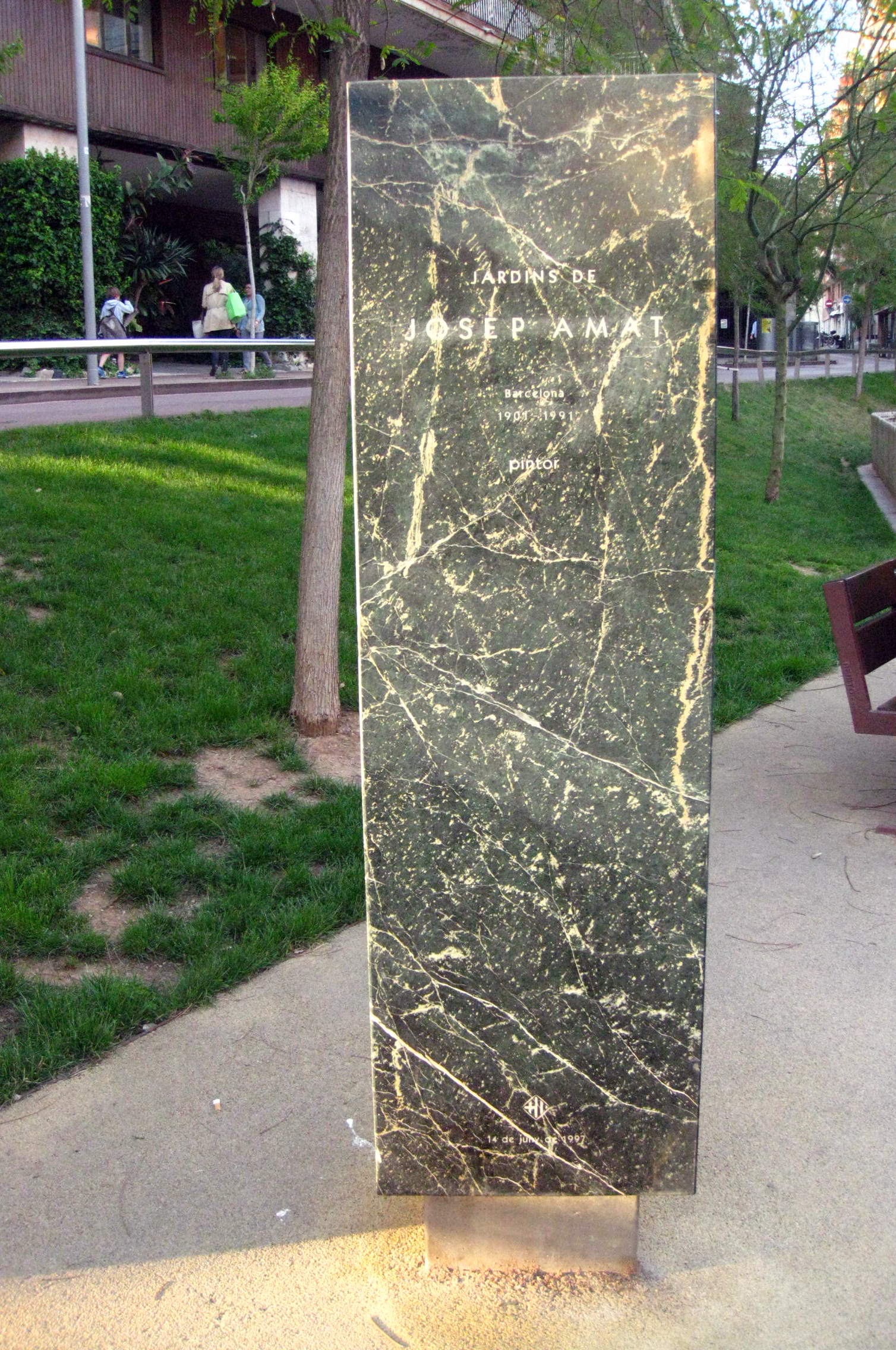 Jardins de Josep Amat (Anna Ribas). Ronda General Mitre (Barcelona)